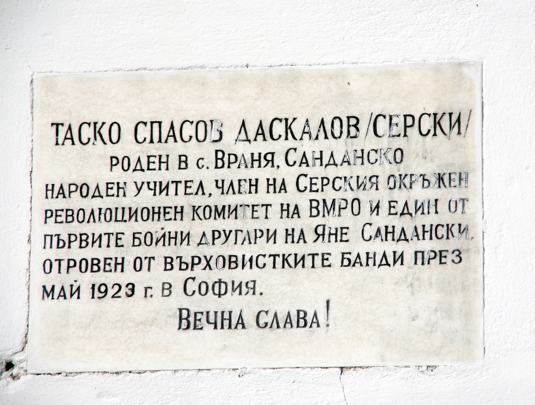 Паметна плоча на къщата на Таската Серски в село Враня, България